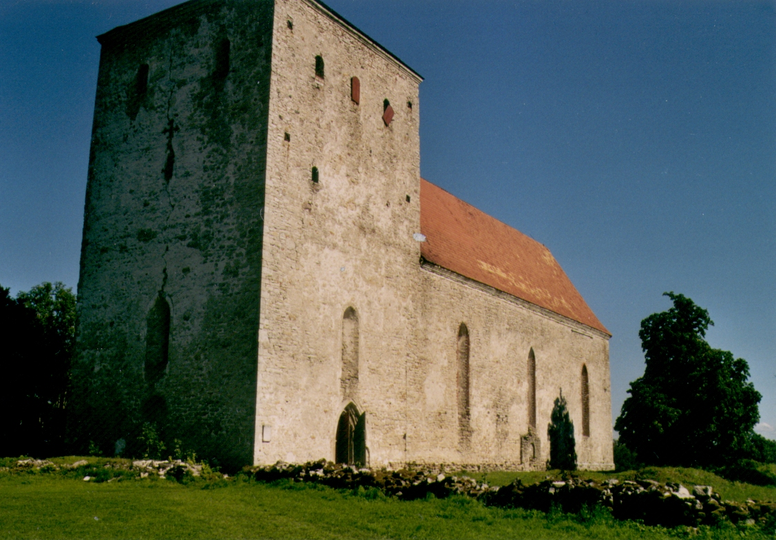 Dorfkirche von Peude, 2005